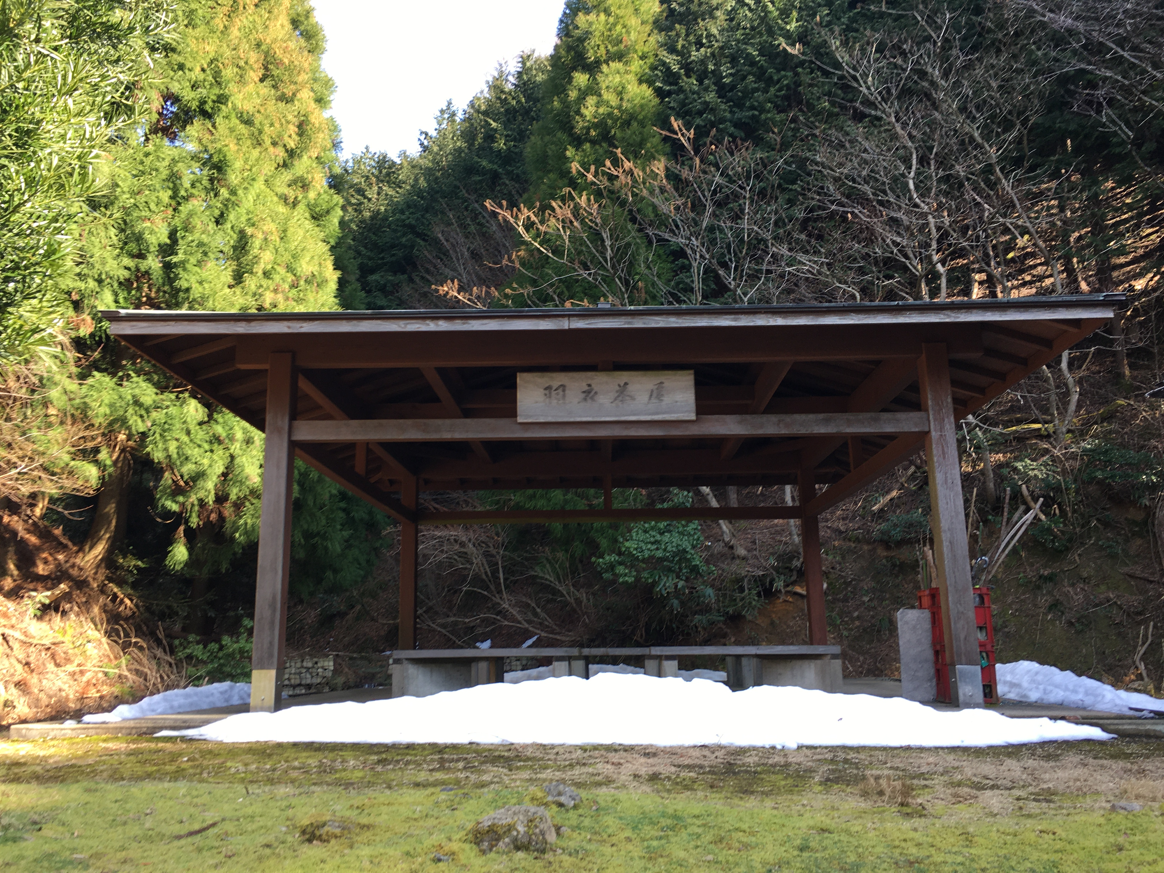 東屋、トイレ